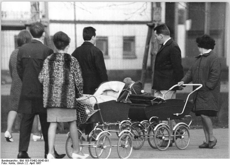 Berlin, Karl-Marx-Allee, Straßenszene Zentralbild Kohls ks. 2.4.1967 Berlin: Wer hat wohl den schönsten Wagen Werden sich die Leute fragen. "Wer hat wohl das schönste Kind - Vater, sag´es mir geschwind!" Doch auch bei allem Selbstvertrauen Sollte man nach vorne schauen! Denn sonst gibts schnell ein Weh-Weh In der Karl-Marx-Allee!